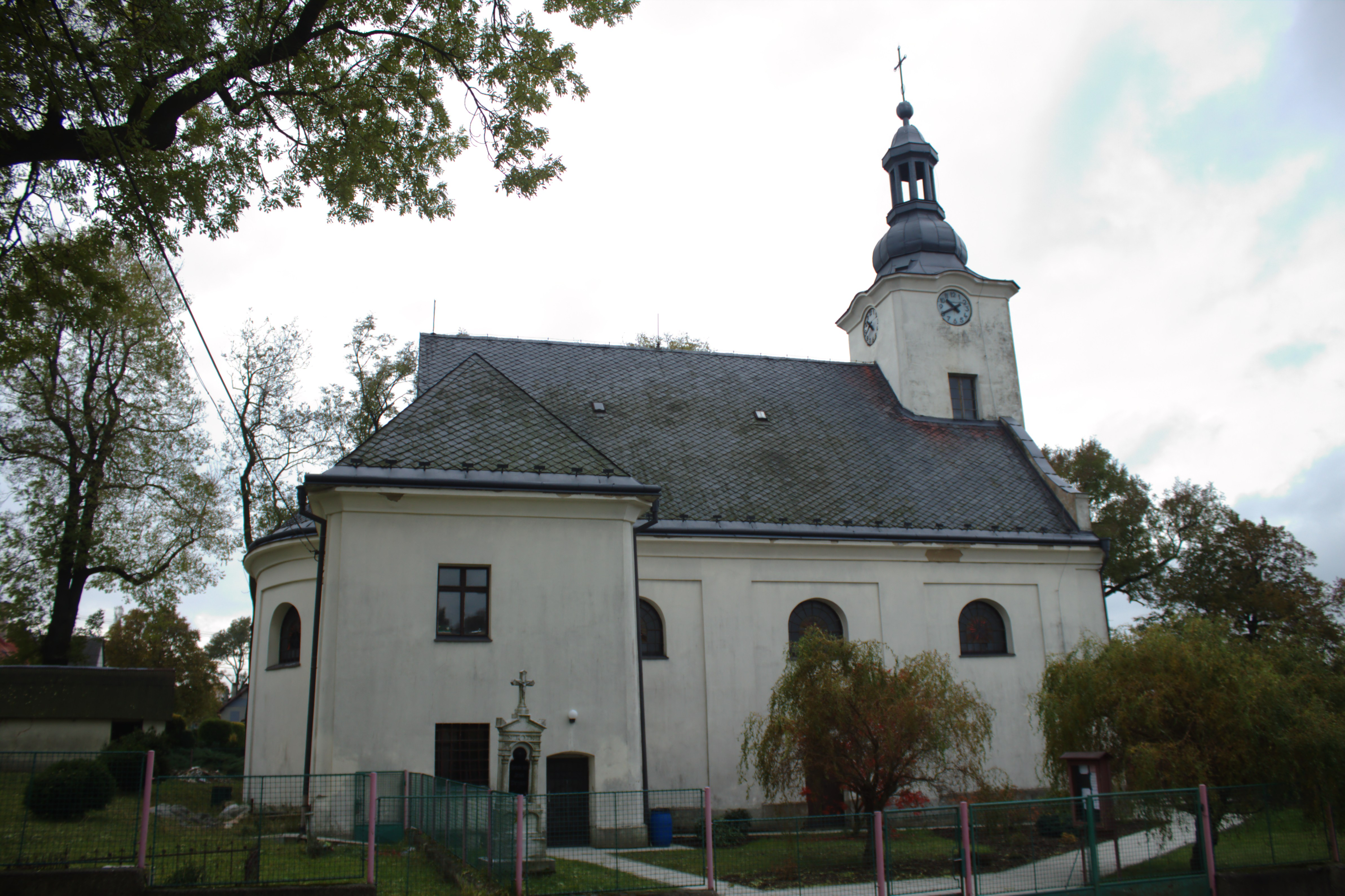 Kostel svatého Filipa a Jakuba v Moravici. Okres Opava, Česká republika.